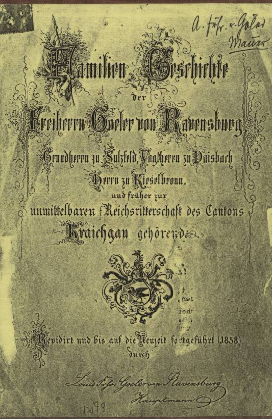 Titelblatt der Familienchronik der Freiherren Göler von Ravensburg (1858) aus dem Besitz des Albrecht von Göler in Mauer